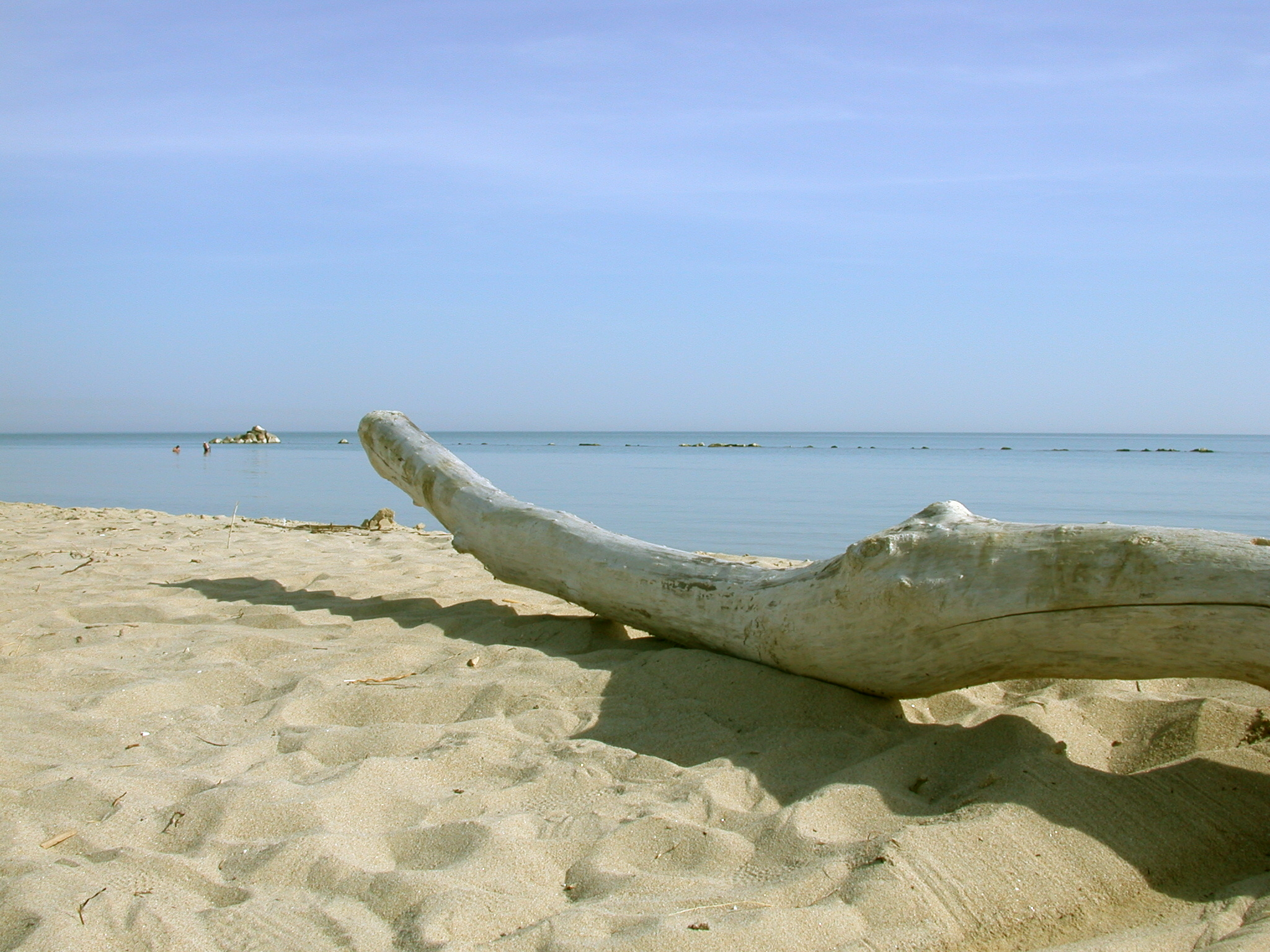 Tronco portato dal mare sulla spiaggia dorata di Petacciato By Antonio Greco